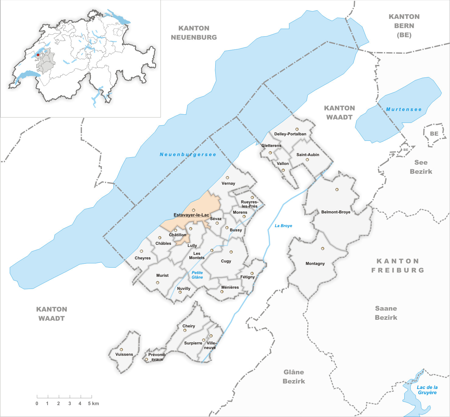 Municipality Estavayer-le-Lac